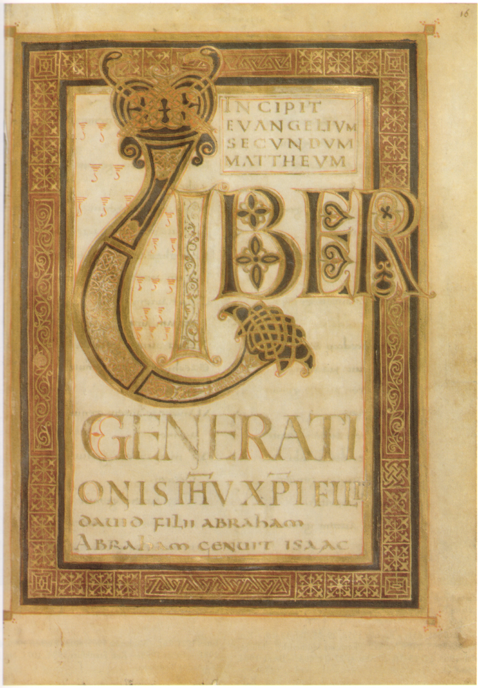 Paris, Bibl. de l'Arsenal, Ms. 599 (16r) Evangeliar aus Saint-Martin-des-Champs Aachen, Hofschule Karls d. Großen, um 790 Initialseite